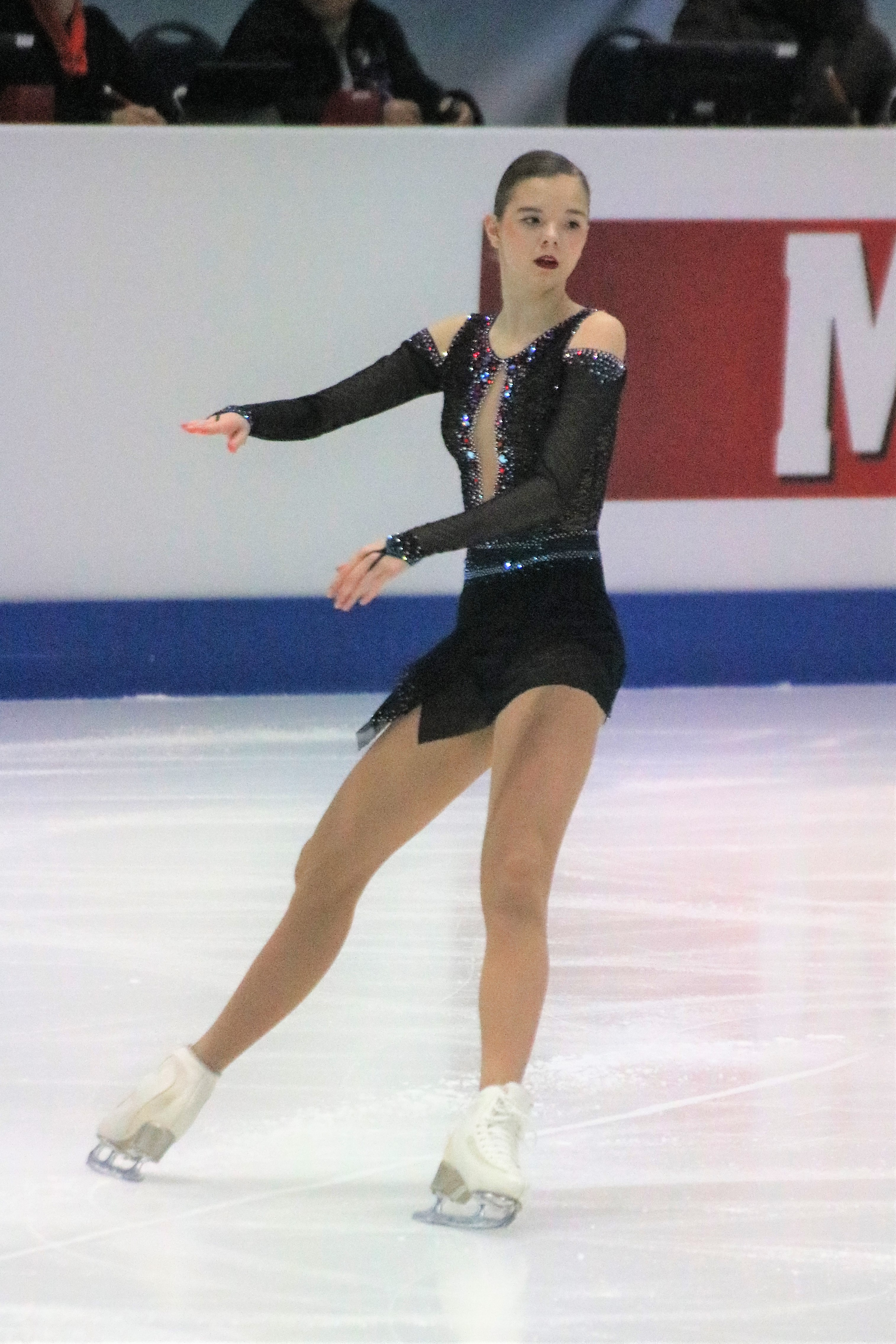 Виктория Сафонова (Беларусь) на чемпионате Европы по фигурному катанию 2020